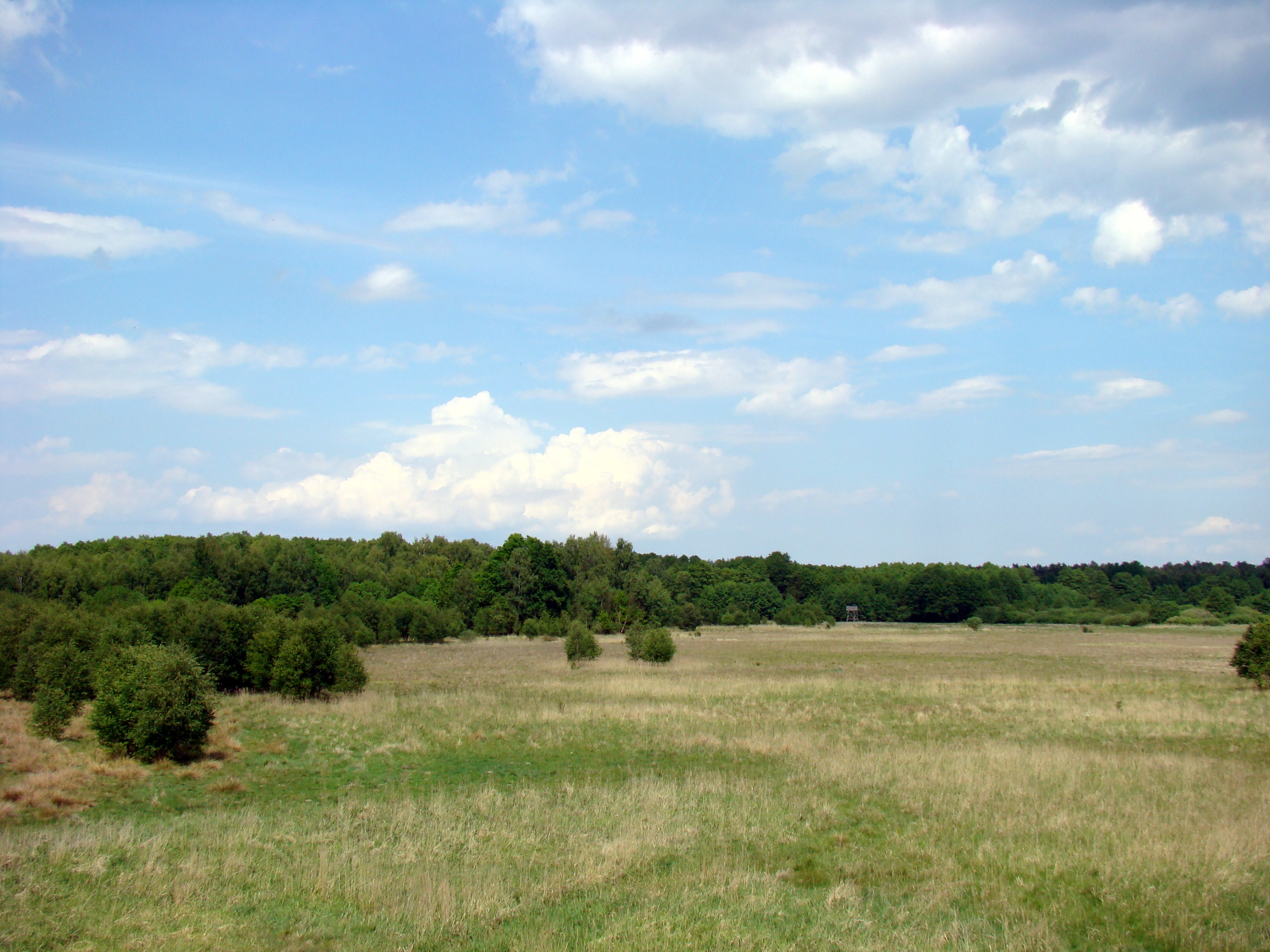 Równina Wkrzańska (k. Karpina), Puszcza Wkrzańska, (Powiat policki, Województwo zachodniopomorskie), Polska